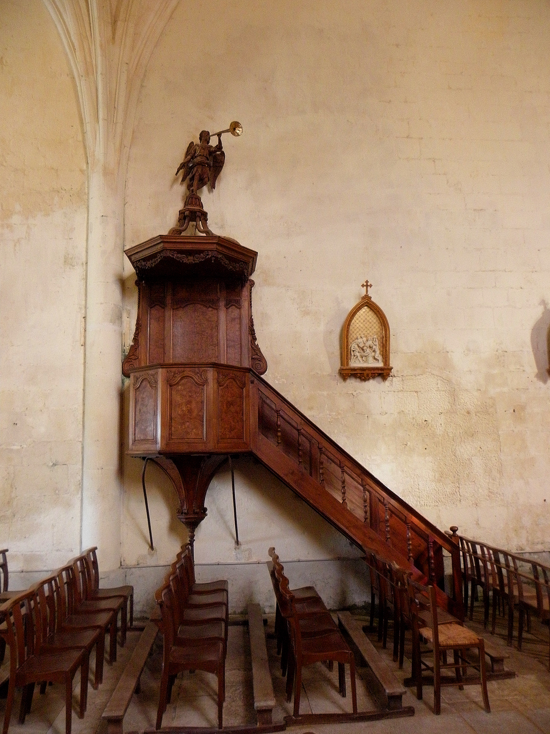 Église Saint-Sauveur de Bignay (17). Chaire à prêcher.